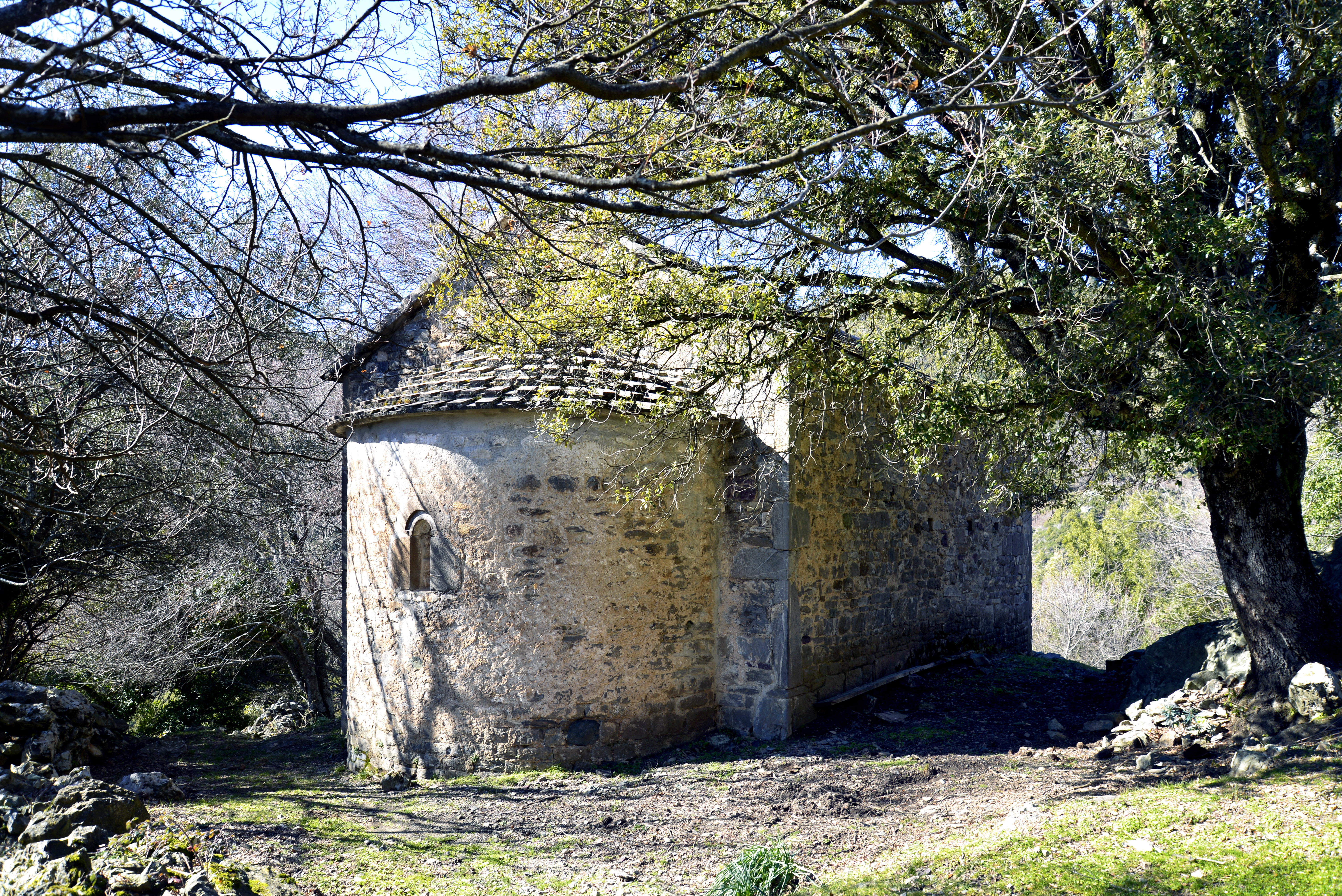 Castellare-di-Mercurio, Bozio (Haute-Corse) - Chapelle San Michele située en pleine forêt au nord du village, accessible par un piste ravinée depuis la D41. Édifice roman, elle est datée du IXe siècle ou Xe siècle.